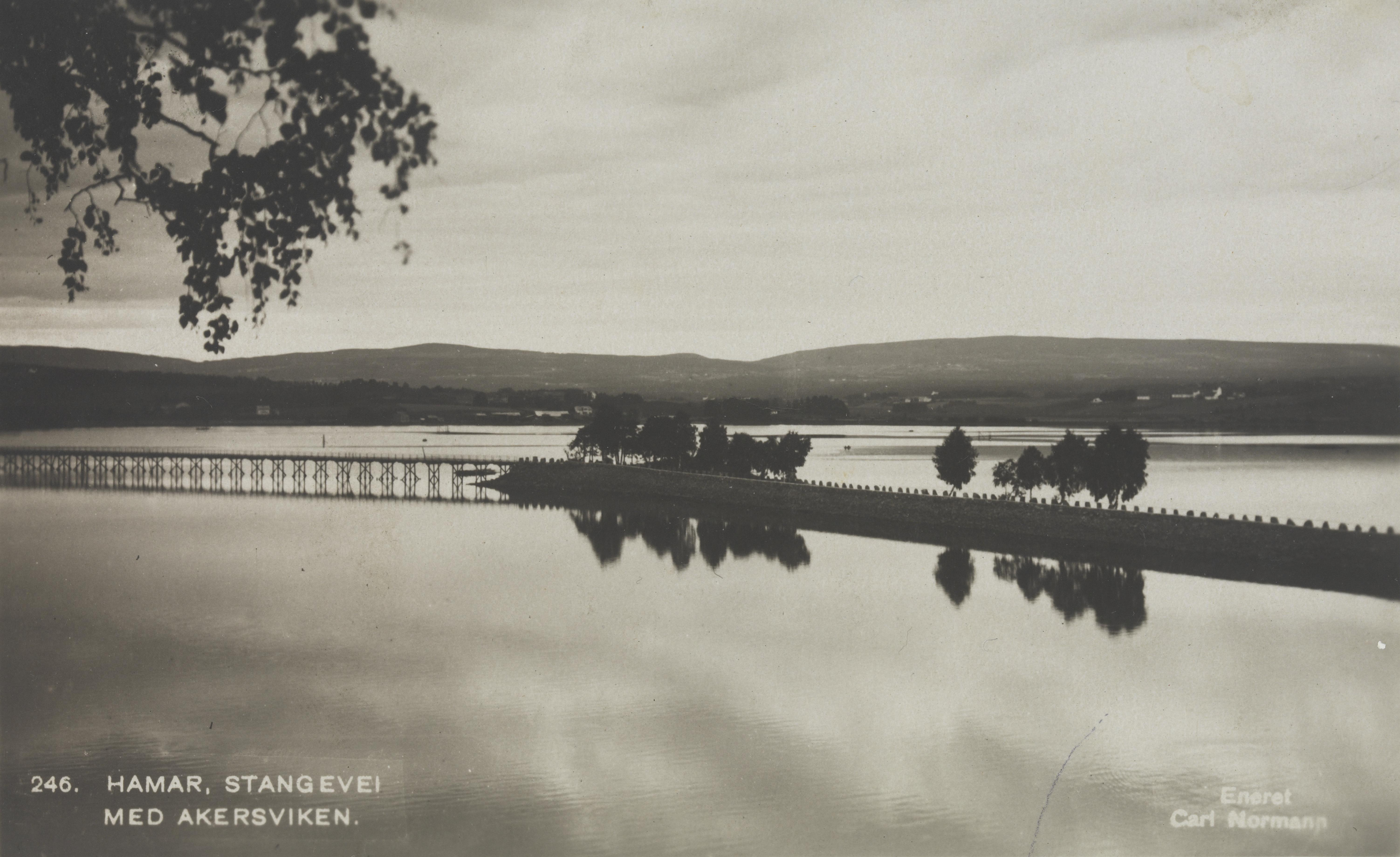 Bildet er hentet fra Nasjonalbibliotekets bildesamling Akersvika, Hamar, Hedmark